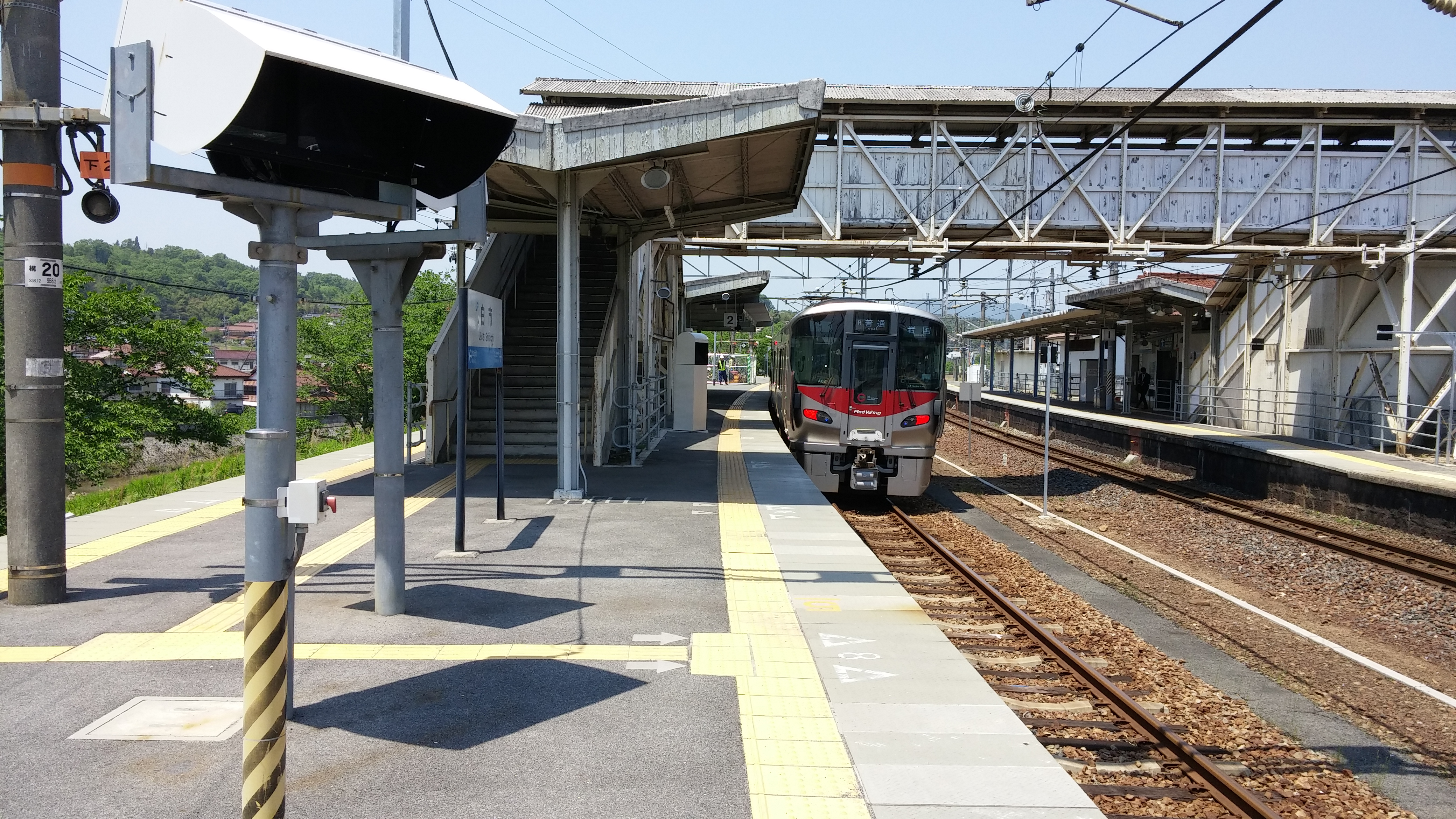 JR白市駅ホーム